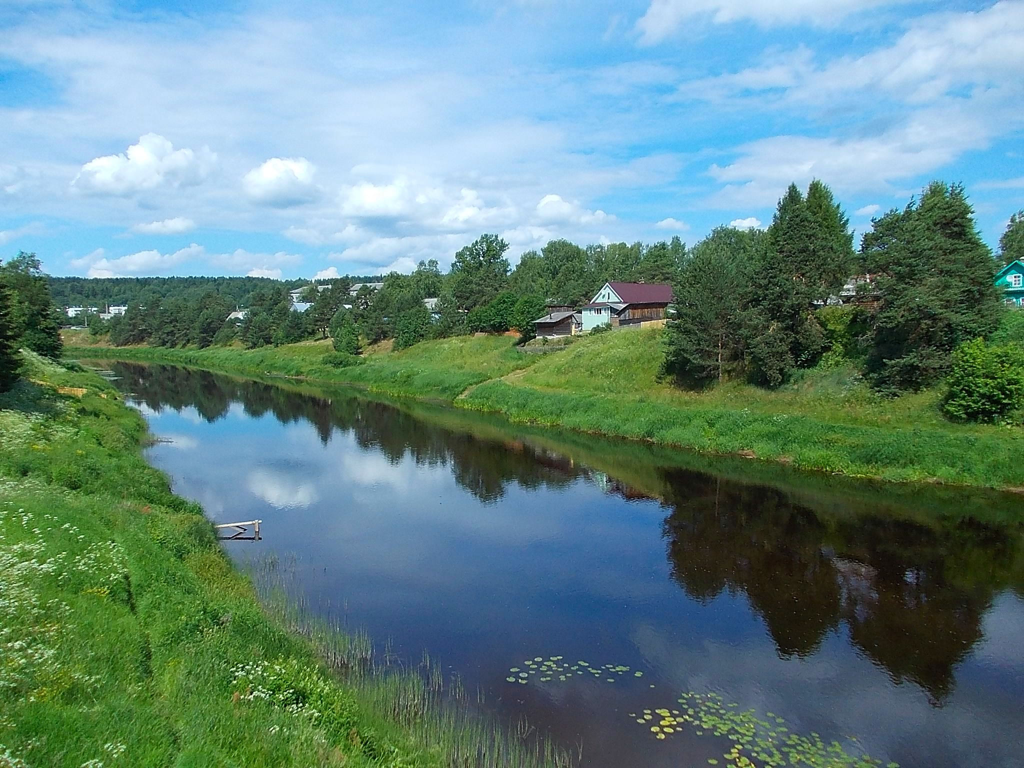 Река Оять в селе Винницы